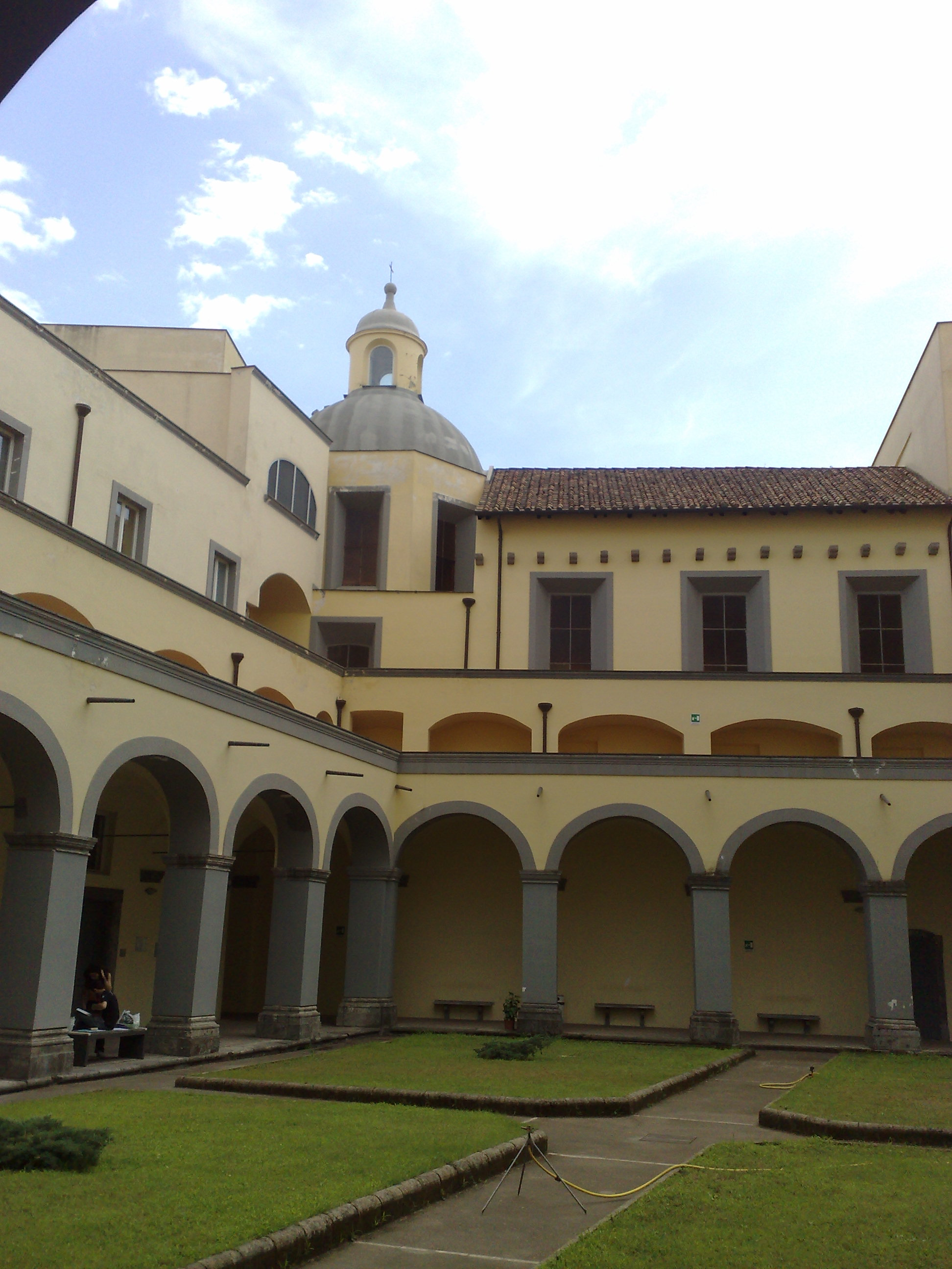 Chiostro del Complesso di Sant'Antonio delle Monache a Port'Alba (Napoli)